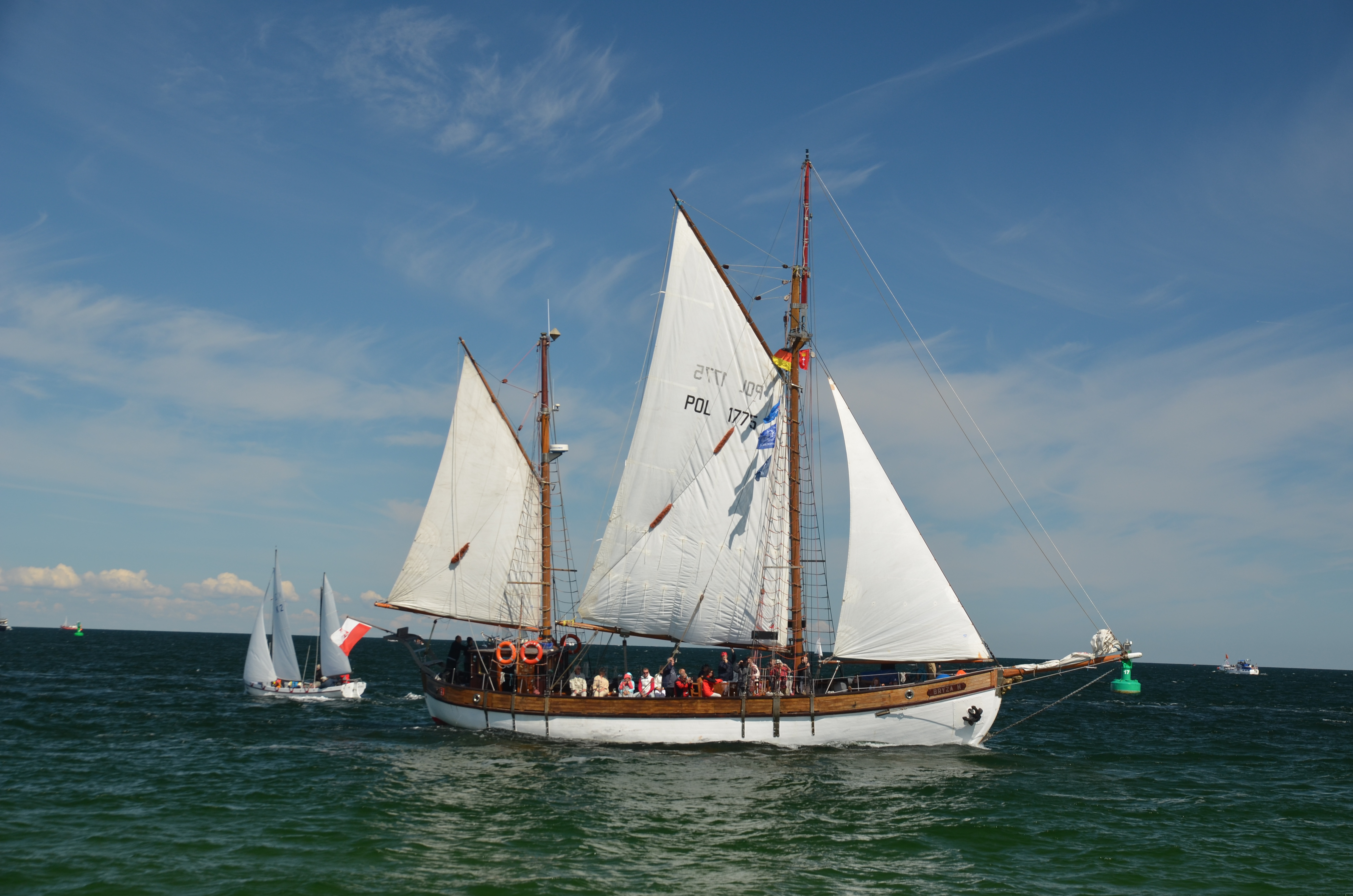 Impressionen von der 22. Hansesail 2012